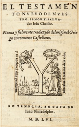 El testamento nuevo de nuestro señor y salvador Iesu Christo. Nueva y fielmente traduzido del original Griego en romance Castellano. “Venecia: Juan Philadelpho” [Geneva: Jean Crespin], 1556.